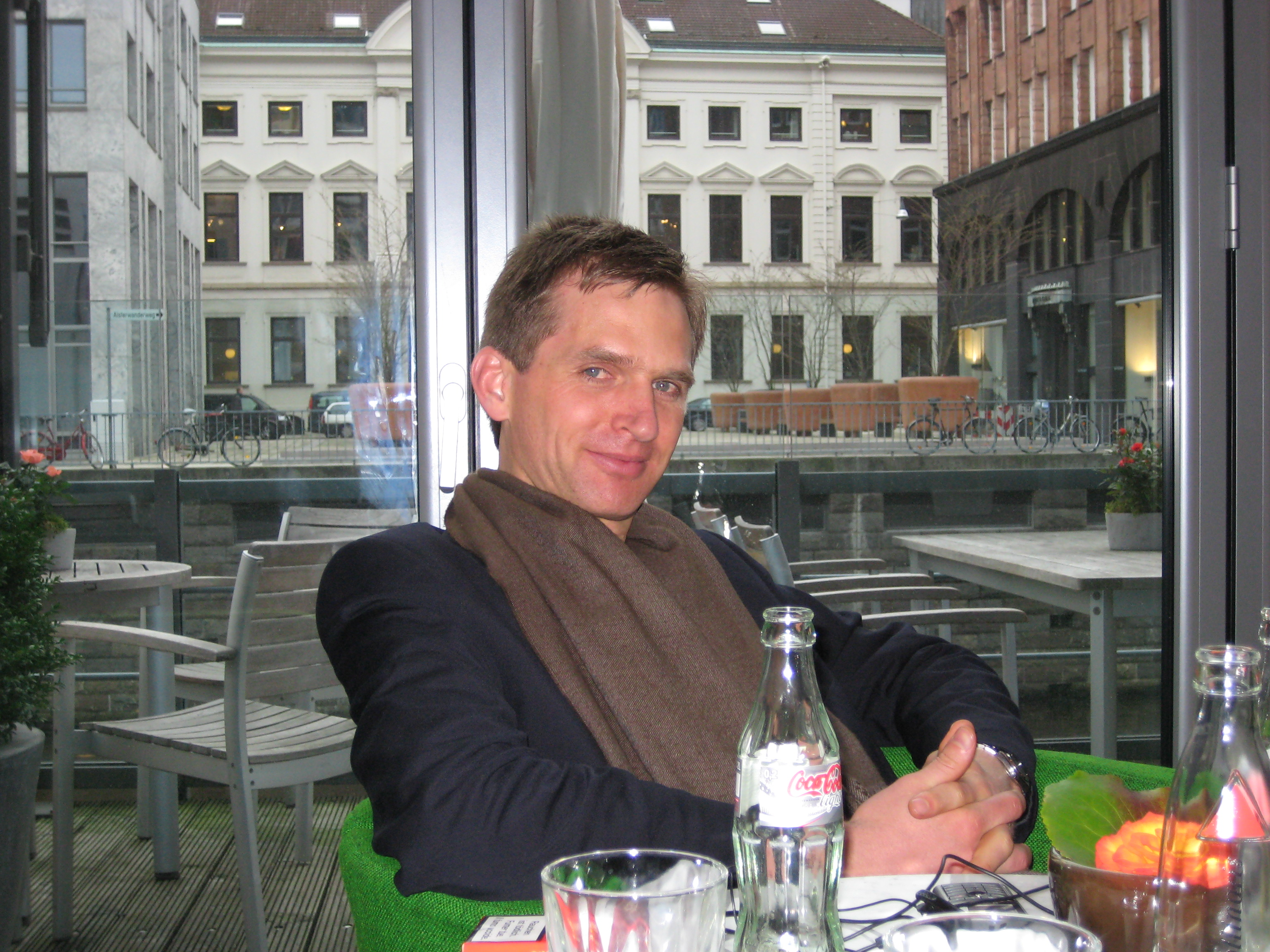 Klaus Schnellenkamp at German Talkshow, 2007